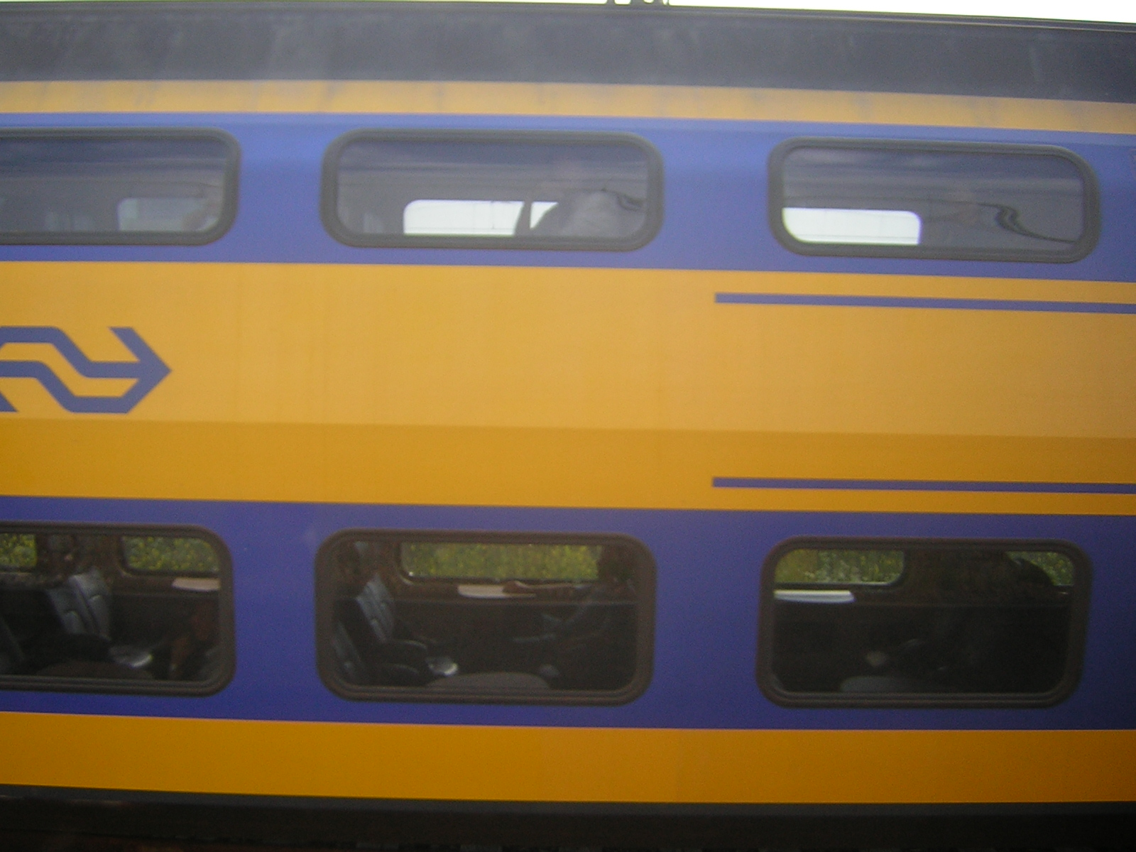 w